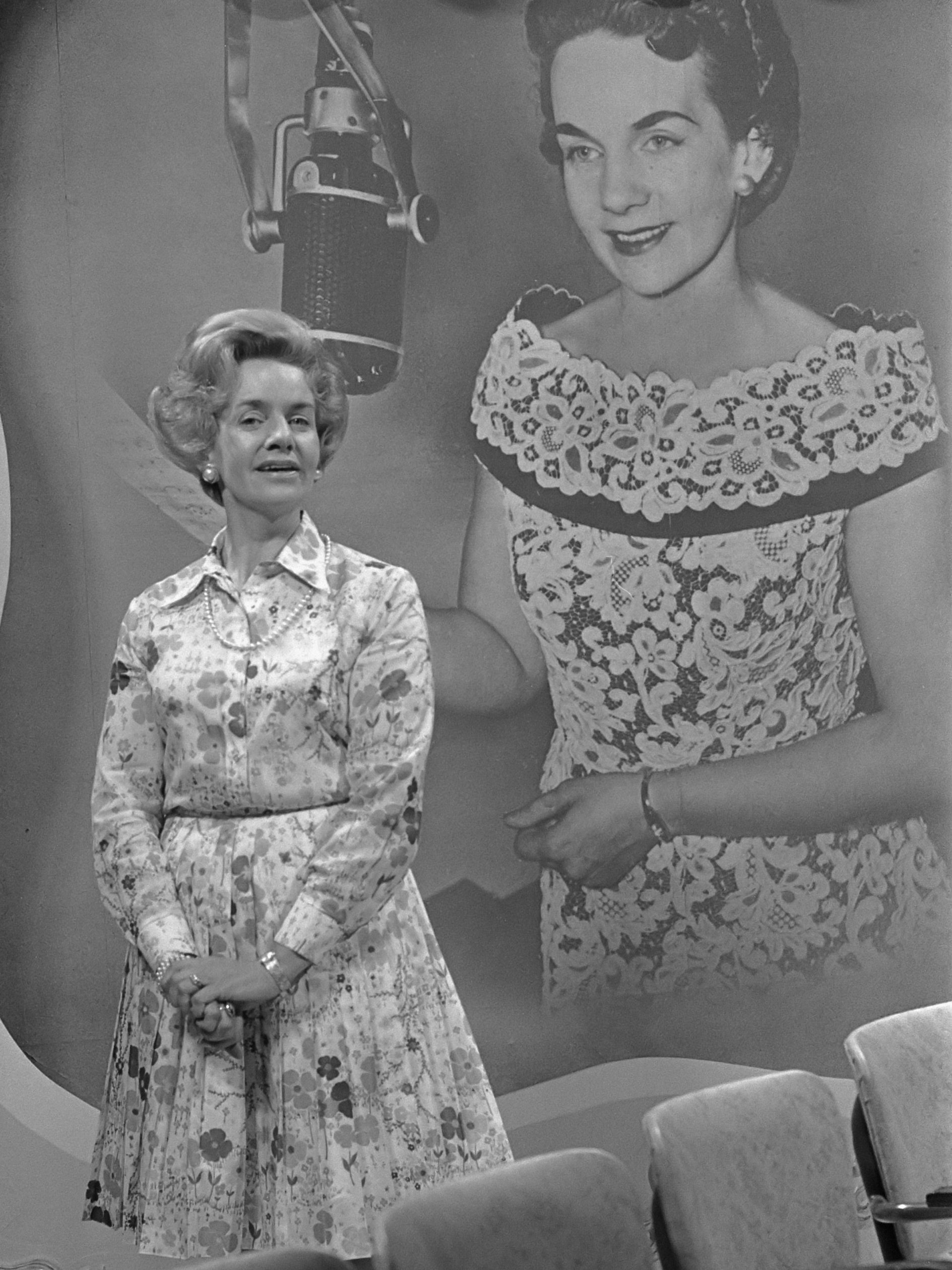 TV-programma Op Losse Groeven , Truus Koopmans 16 augustus 1972